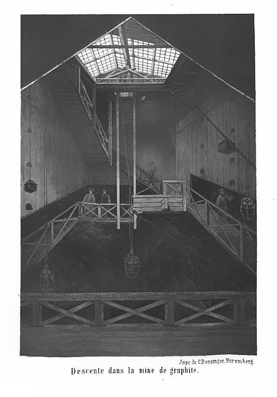 Intérieur de la mine de graphite de Batougol (monts Saïan, Sibérie), découverte en 1847 et exploitée par Jean-Pierre Alibert. Planche tirée de La mine de graphite de Sibérie découverte en 1847 par M. J.-P. Alibert, Paris, Poitevin, 1865.